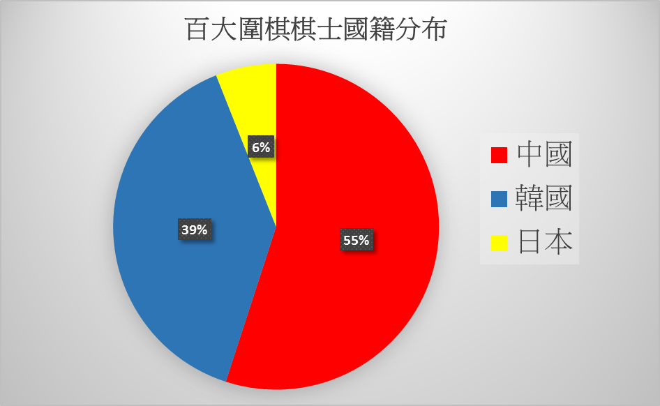 Go Ratings前百大棋士的國籍